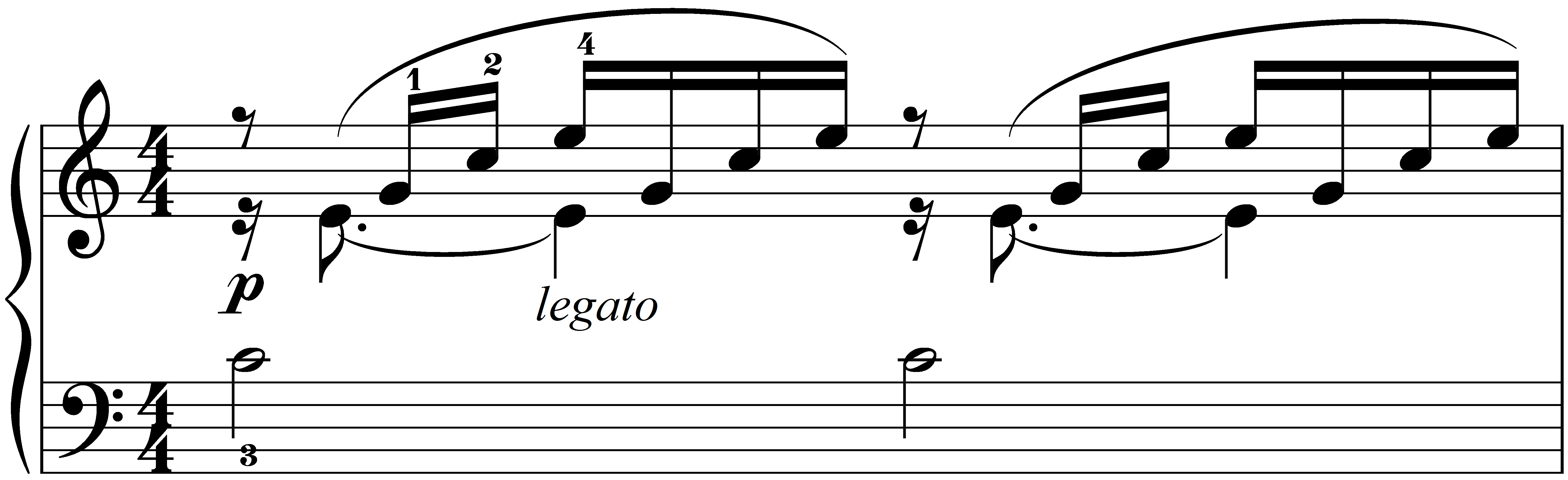 Legato-Beispiel am Wohltemperiertem Klavier I, Präludium Nr. 1